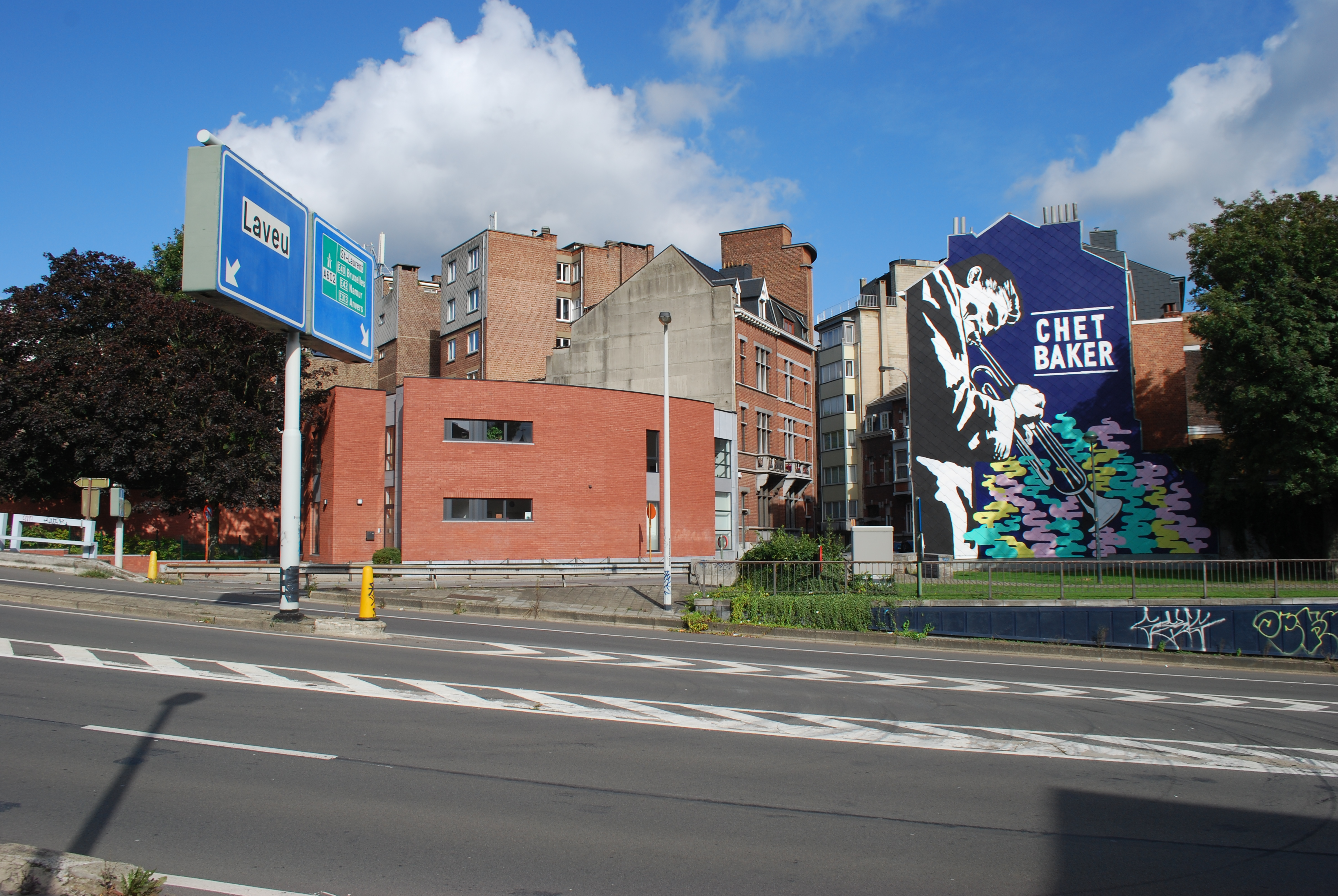 Vue de la rue Charles Morren et la rampe d'accès à l'autoroute depuis le boulevard d'Avroy à Liège.